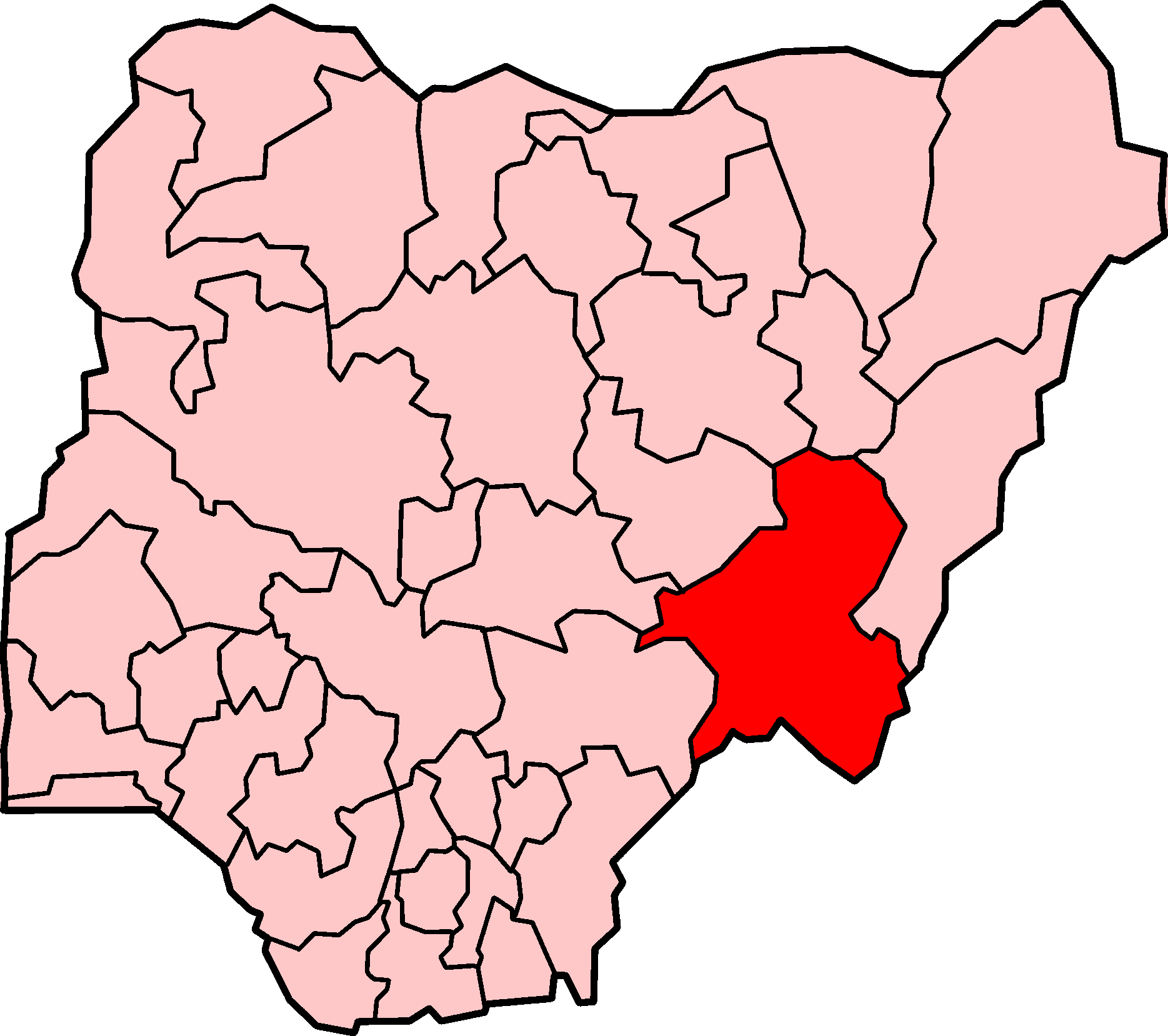 Localização do estado de Taraba na Nigéria.